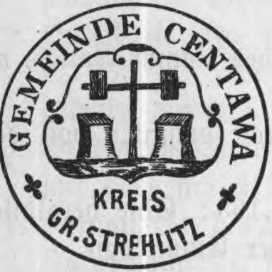 Siegel der Gemeinde Centawa im Kreis Groß Strehlitz 1910.